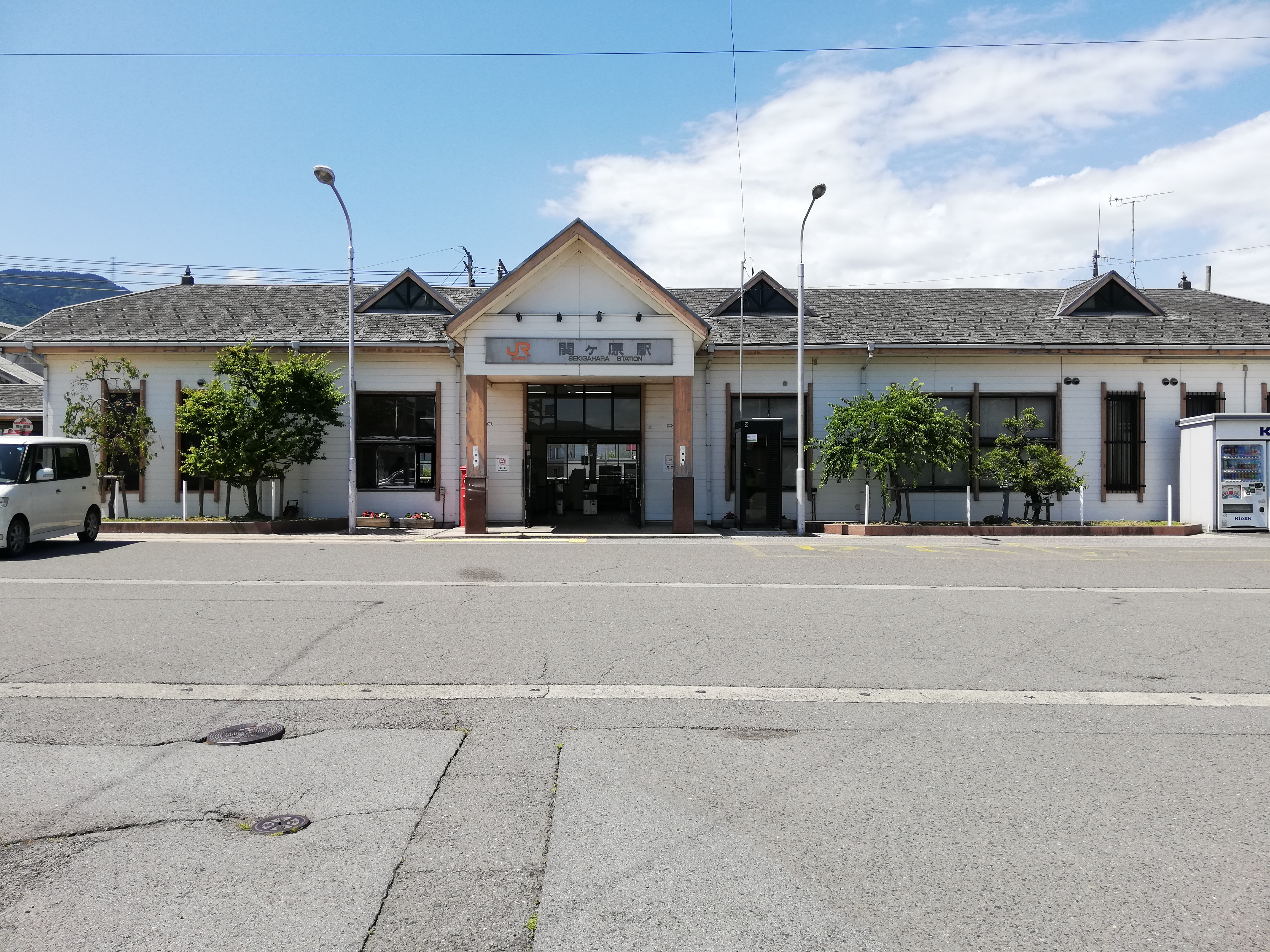 東海道本線の関ケ原駅。